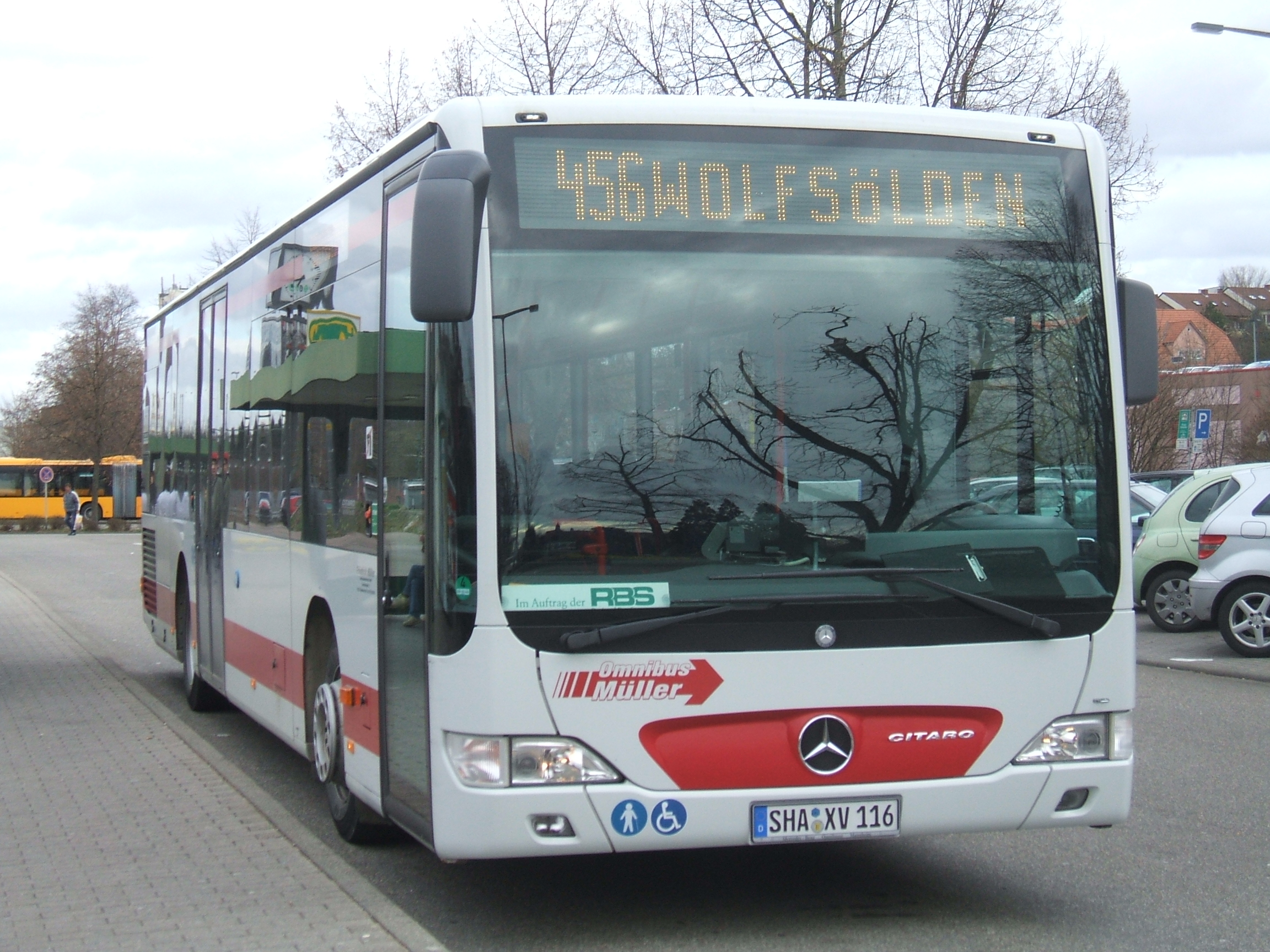 Citaro Überlandbus der RBS-Tochter Firma Müller Schwäbisch Hall